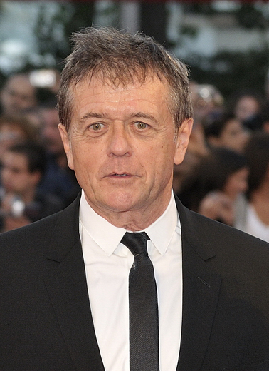 66ème Festival du Cinéma de Venise (Mostra), 4ème jour (05/09/2009) Portrait de Patrice Chéreau issu du Tapis Rouge avec Romain Duris, Jean-Hugues Anglade, Patrice Chéreau (réalisateur) pour le film : Persécution